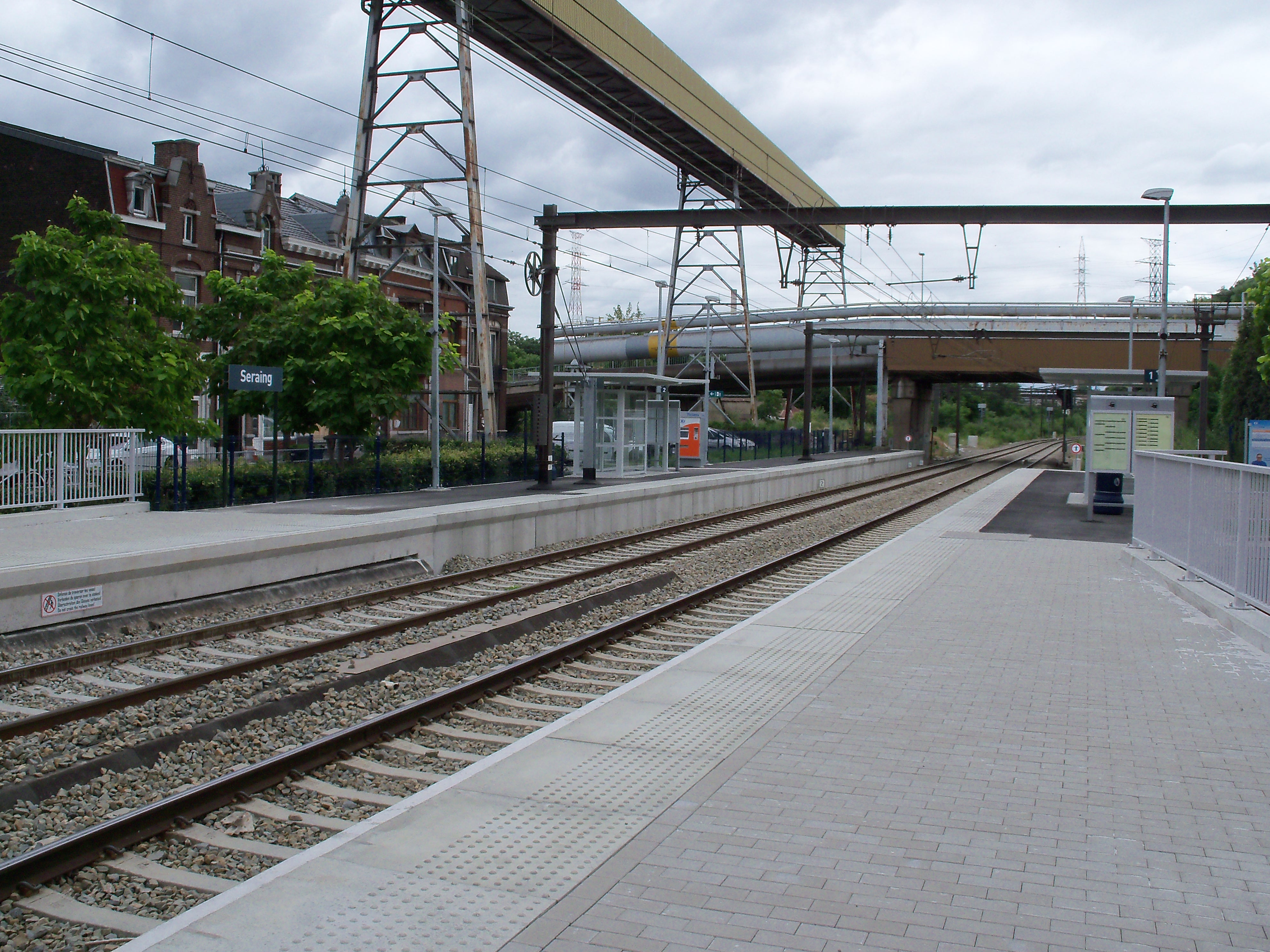 Gare de Seraing, Belgique